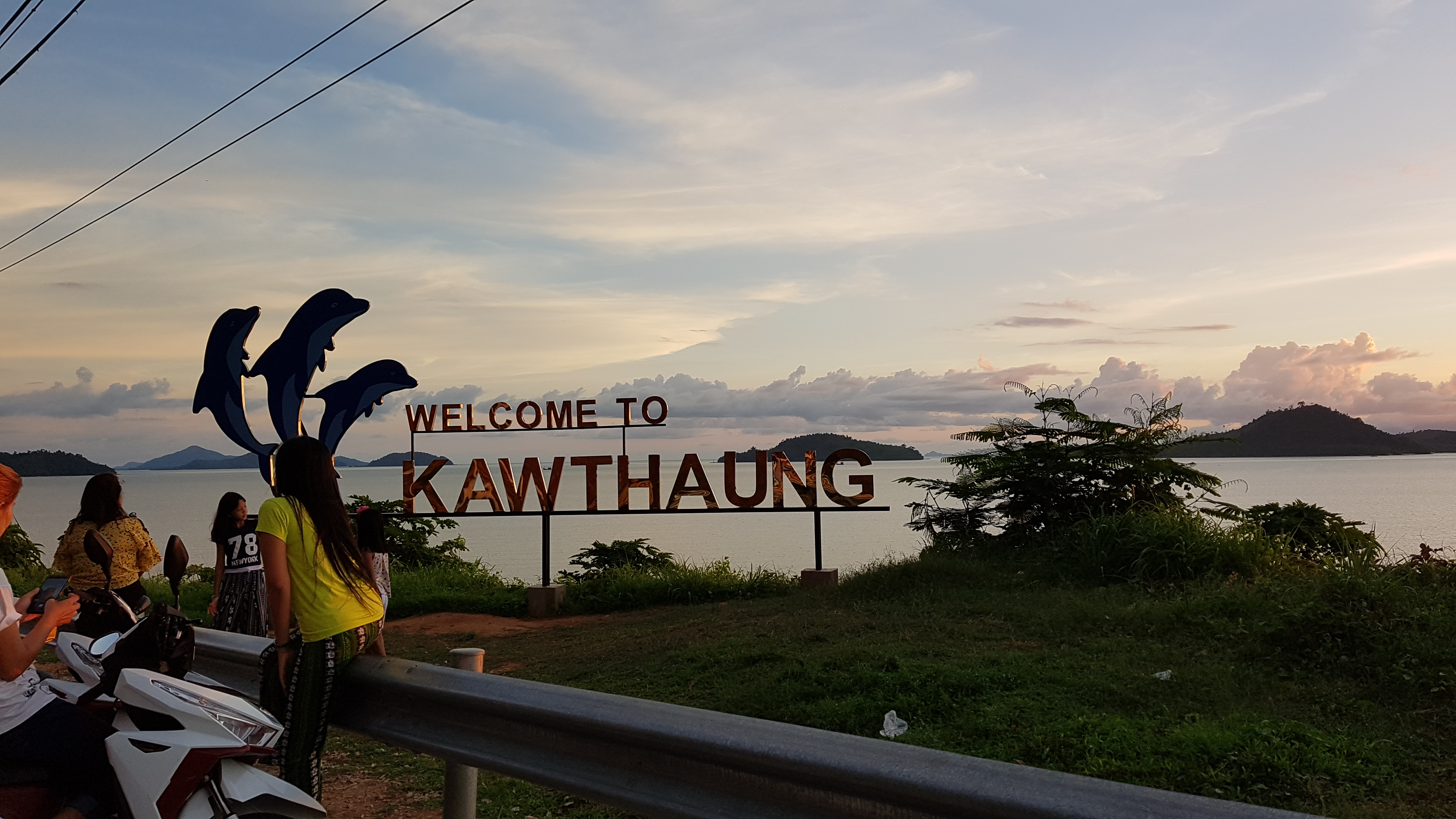 Kawthoung